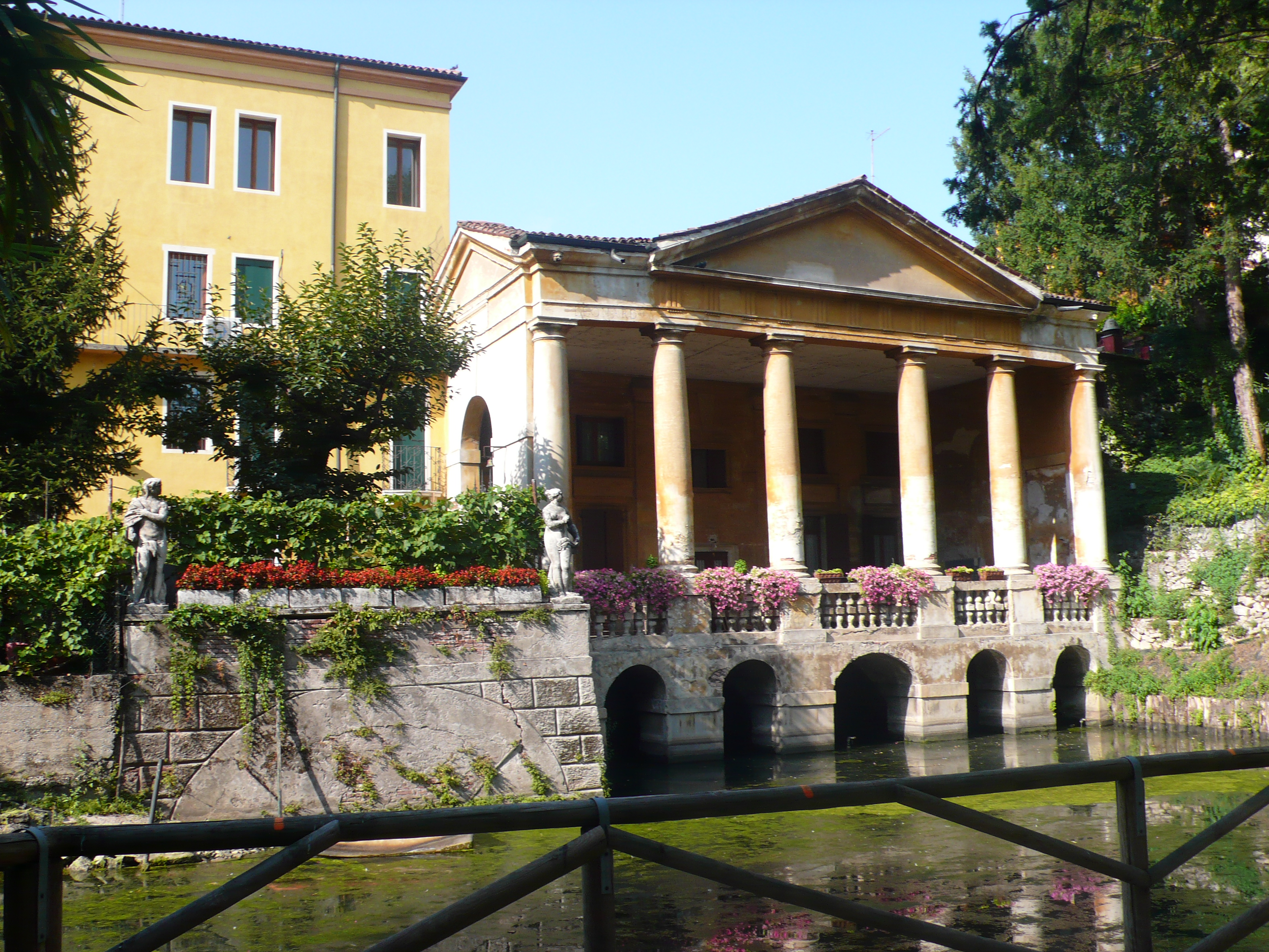 Giardini Salvi This is a photo of a monument which is part of cultural heritage of Italy.